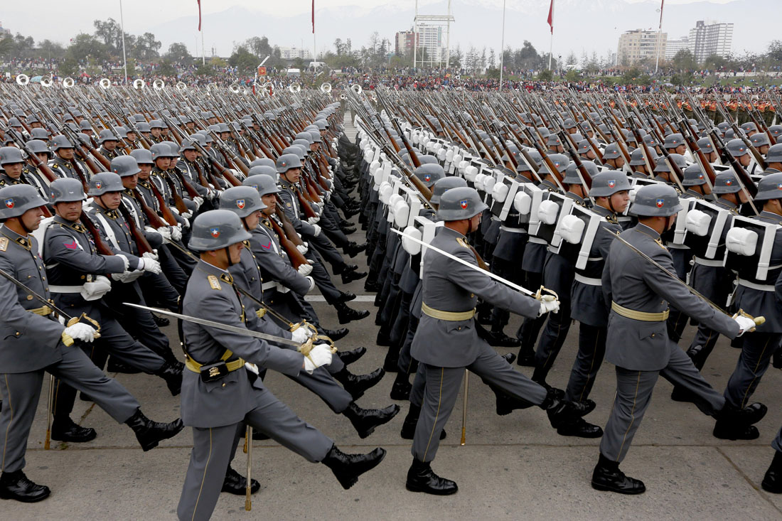 “Hemos terminado la Parada Militar en honor a las Glorias del Ejército en un momento trágico y difícil para el país, pero era necesario también celebrar este día”, afirmó el Ministro de Defensa.